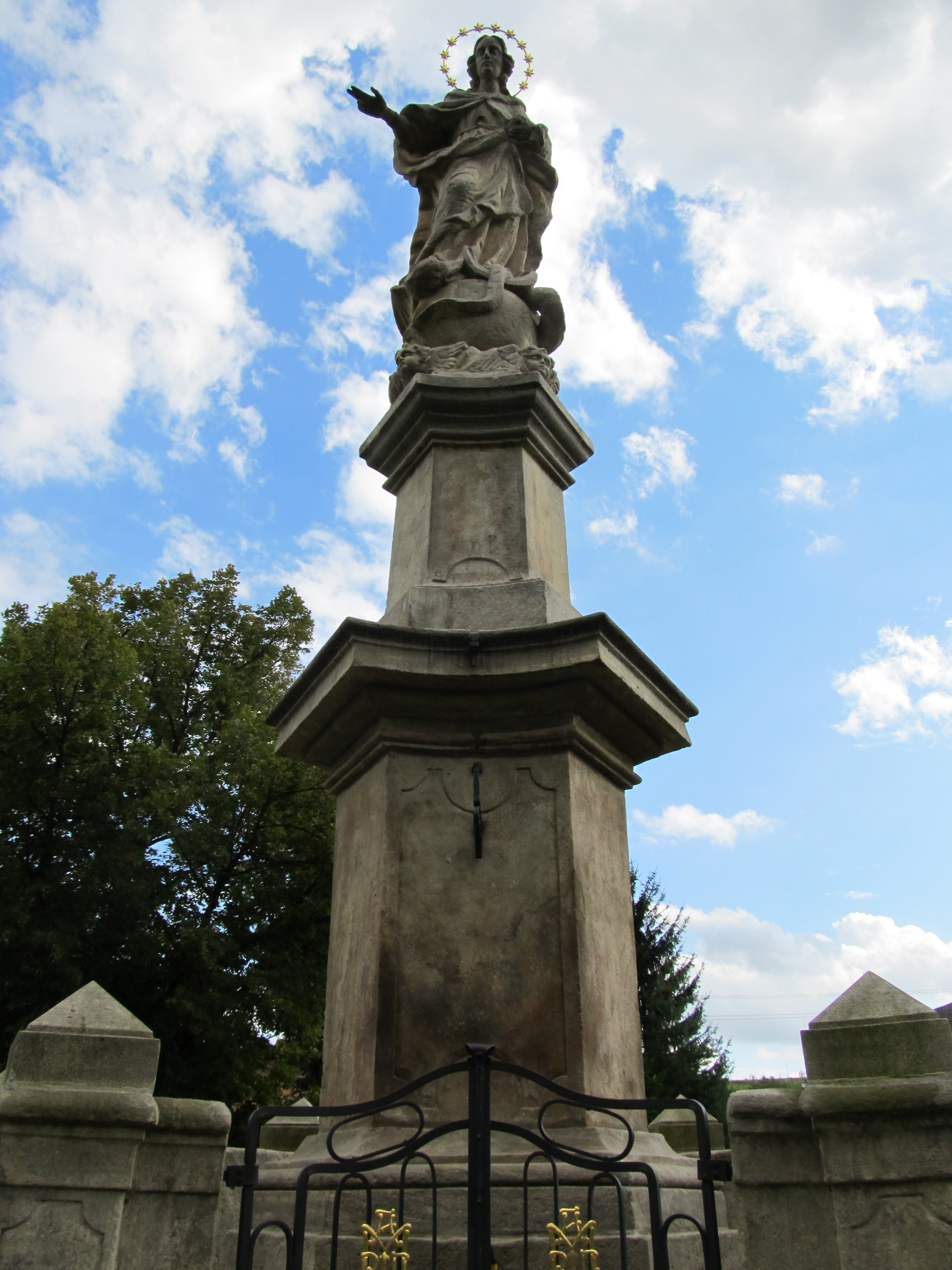 Socha Immaculata (Chvalkovice), Chvalkovice